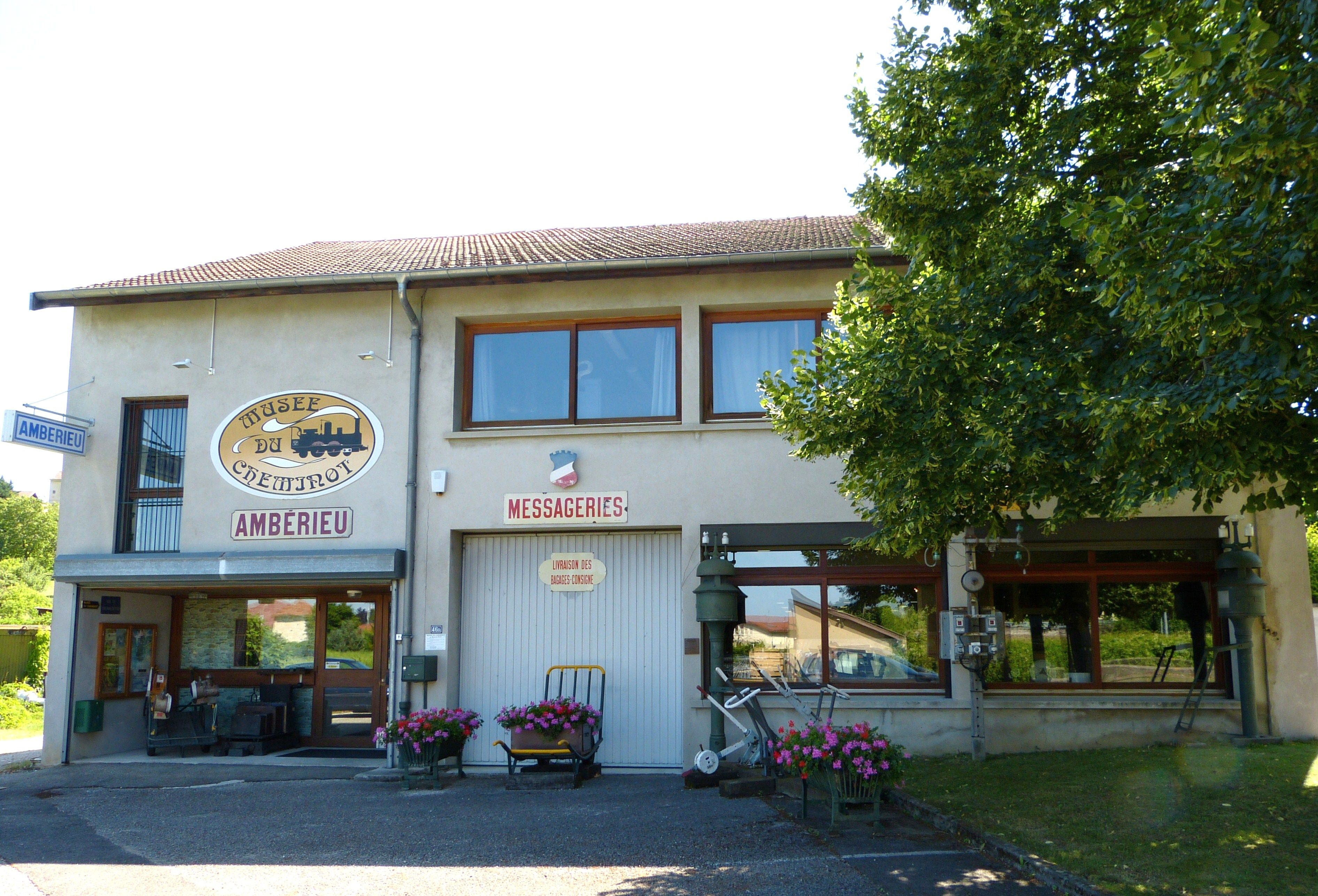 Façade de l'entrée du musée du cheminot